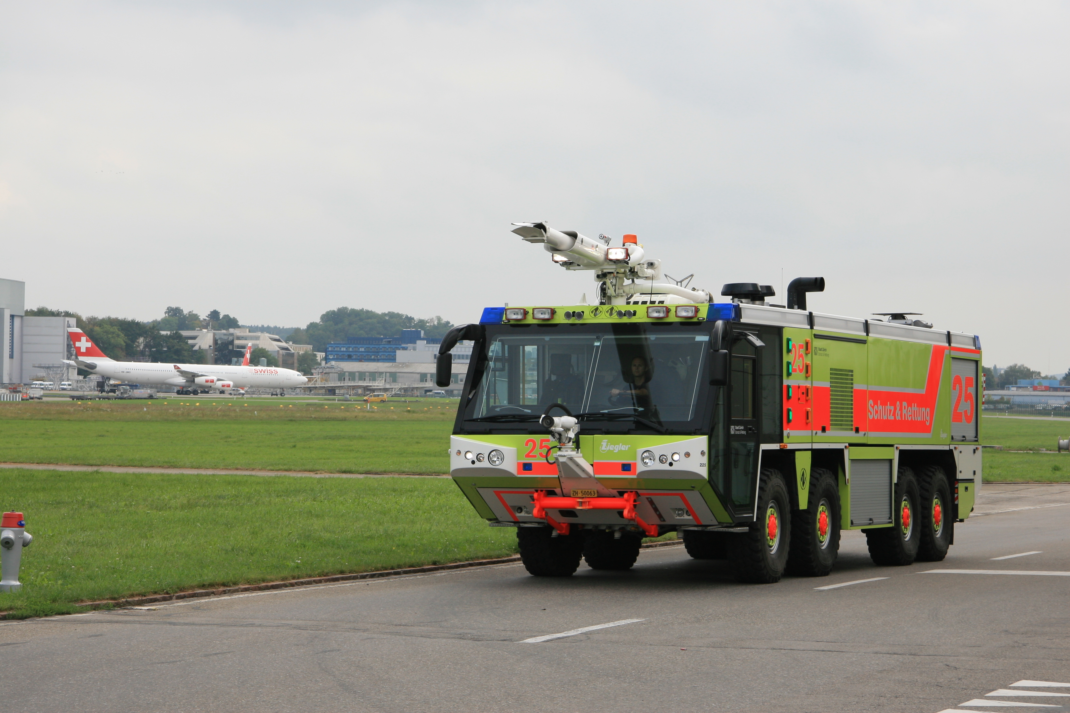 Flugfeldlöschfahrzeug (FLF) der Berufsfeuerwehr von Schutz & Rettung Zürich, Schweiz